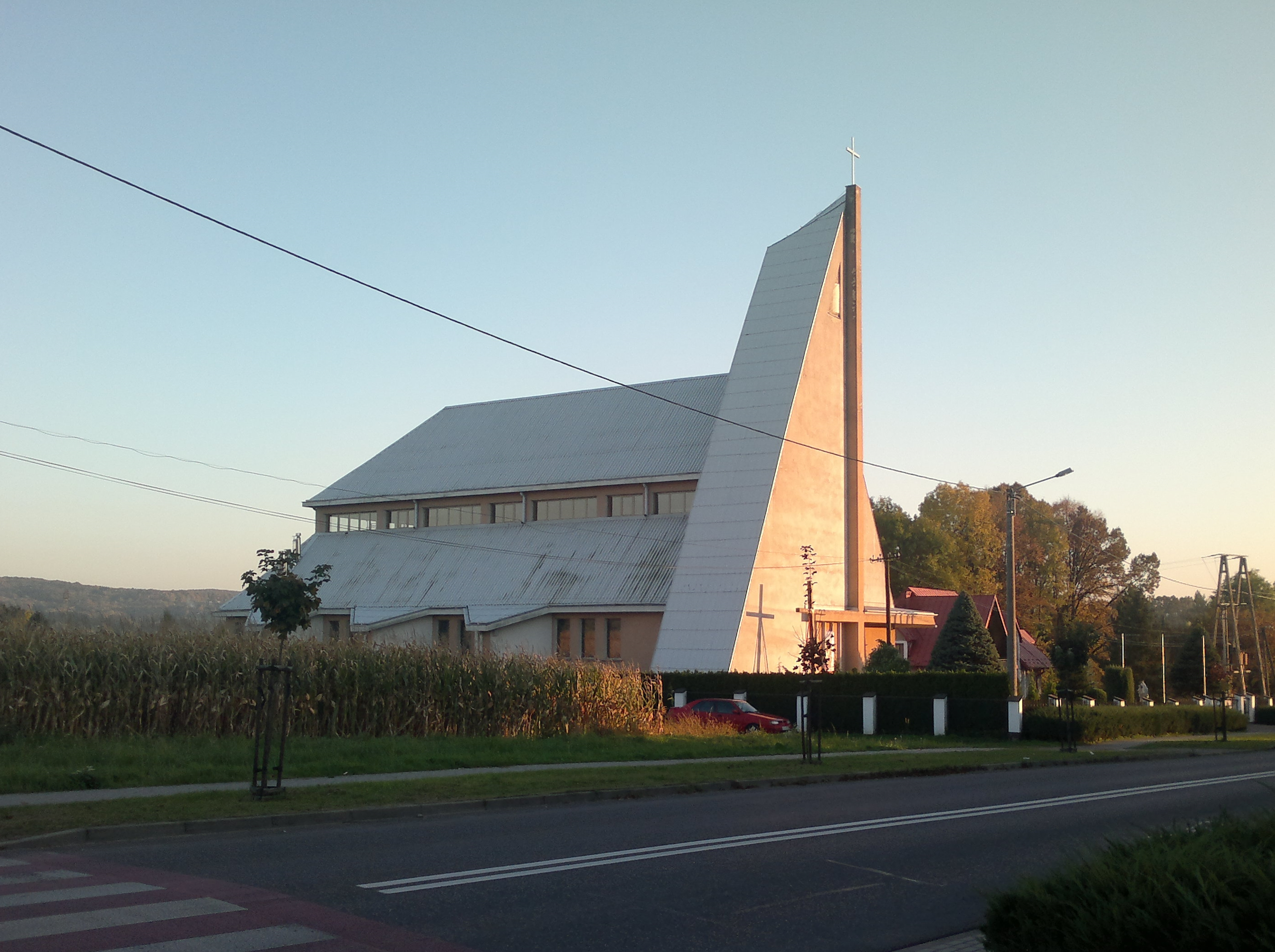 Koszyce Małe. Kościół parafialny p.w. Najświętszego Serca Pana Jezusa. Wybudowany w latach 1985-1991. Fot.16.10.2017